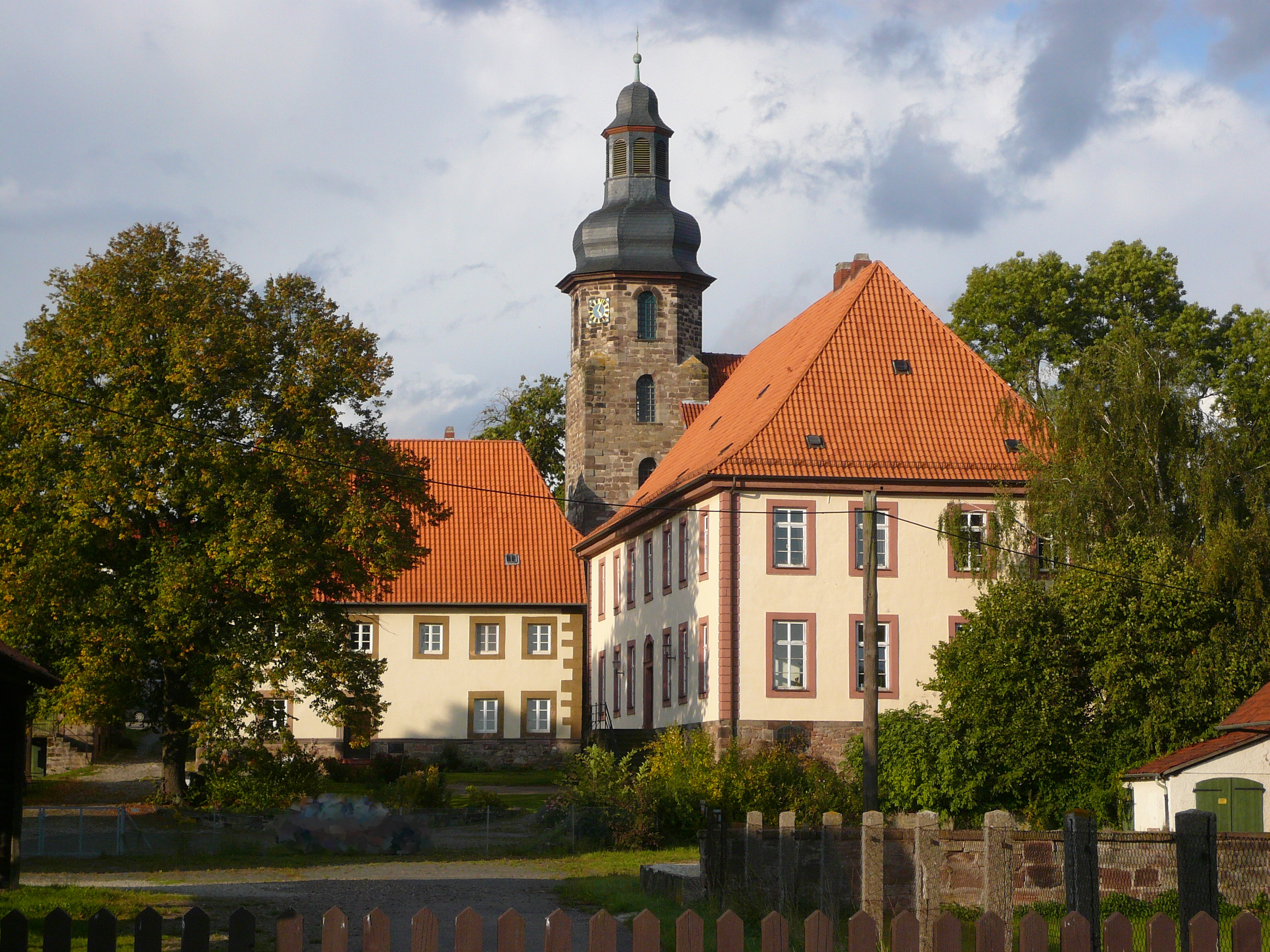 Ehemaliges Klostergut Marienstein bei Nörten-Hardenberg, Landkreis Northeim, Niedersachsen. Links die ehemalige Meierei, rechts das ehemalige Amtshaus (beide erbaut 1724), im Hintergrund die Klosterkirche (erbaut 1724-30).